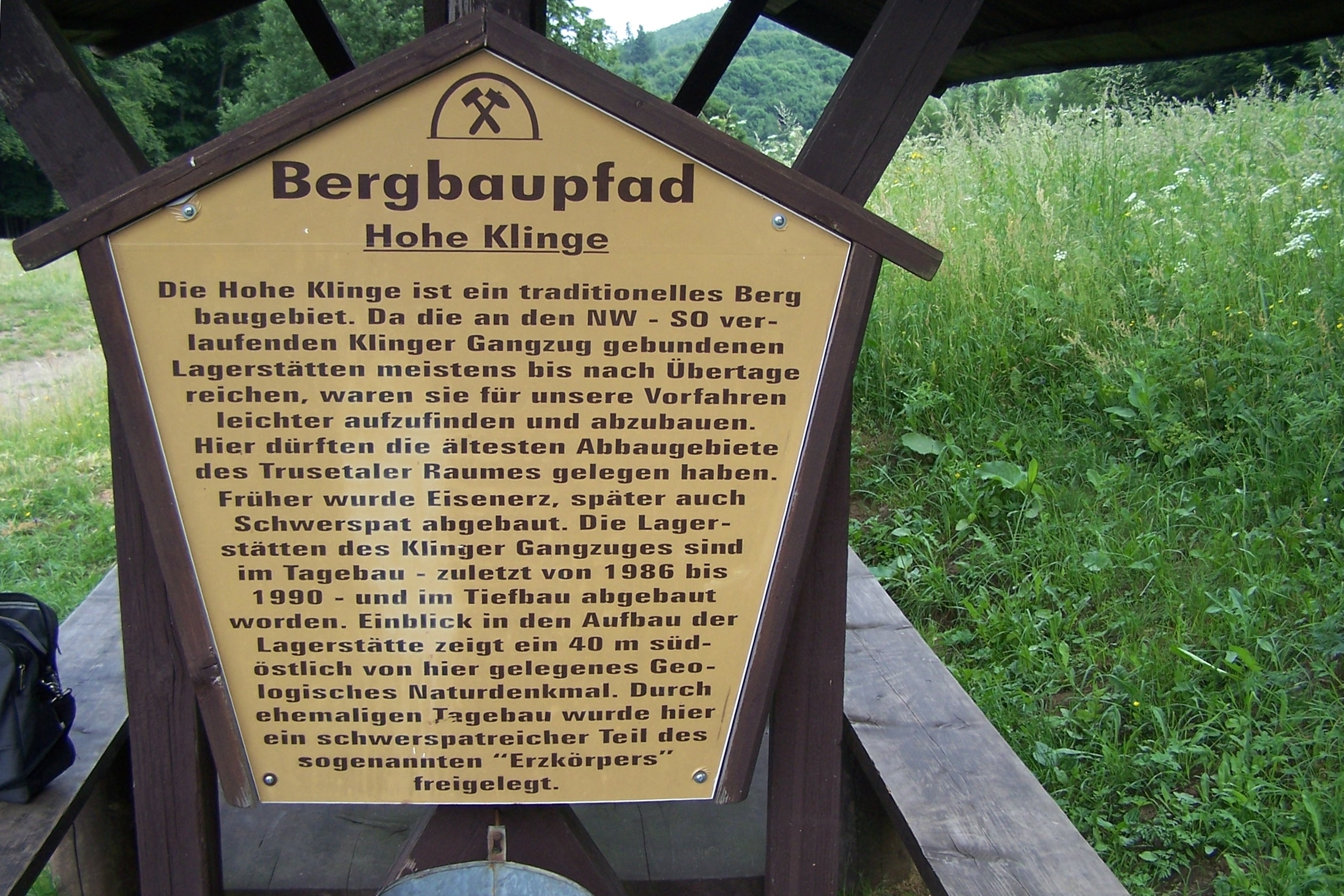 Tafel an Station 15 des Naturkundlichen Lehrpfades Bad-Liebenstein und Umgebung bei Laudenbach, zugleich ein Etappenort am Breitunger Rennsteig.